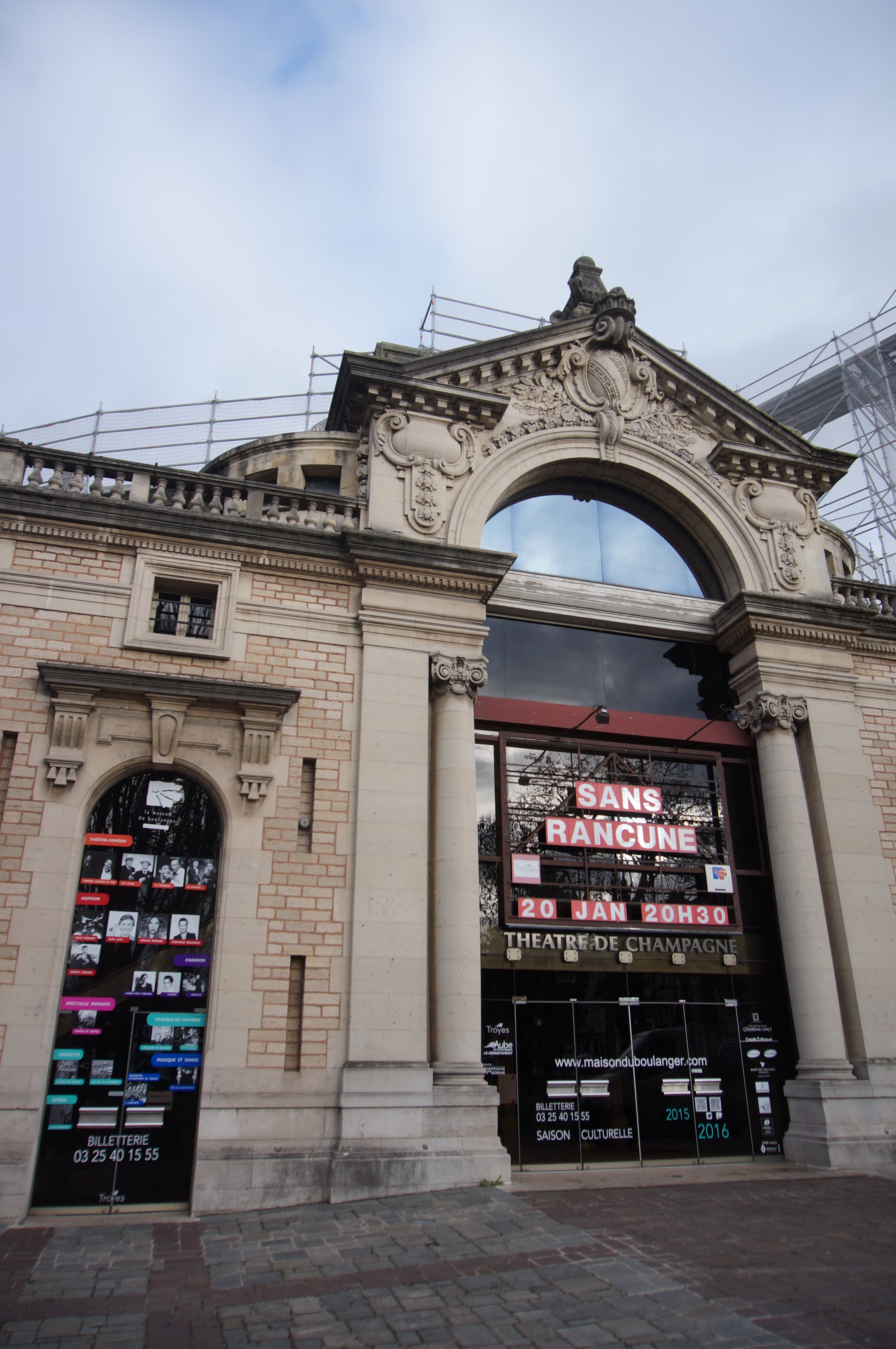 Le Théâtre de Champagne de Troyes, dans l'Aube.